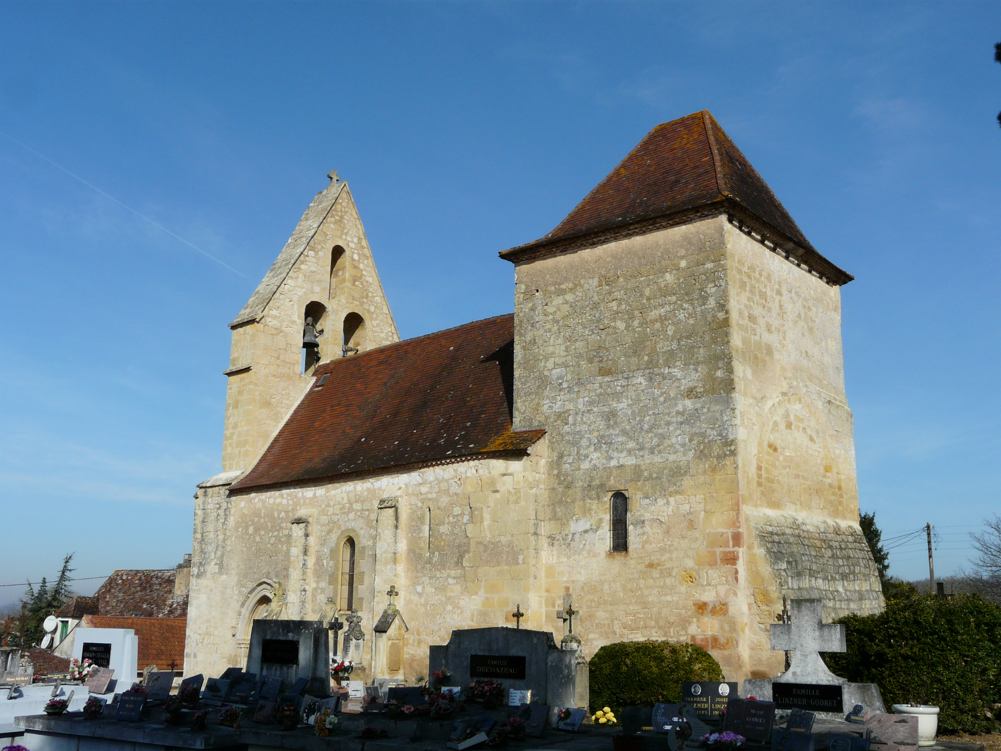 L'église Saint-Avit, Varennes, Dordogne, France.